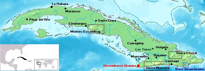 Mapa de Cuba. indicación de principales, lugar de desembarco del Granma y Sierra Maestra